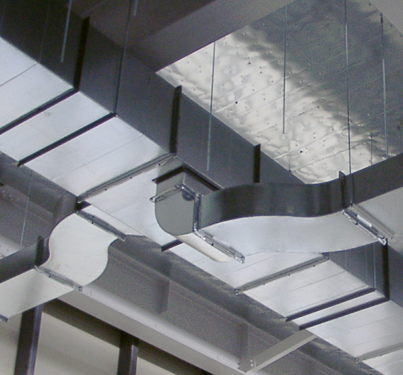 connected air-duct